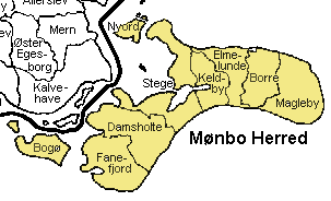 Mønbo Herred Præstø Amt , Denmark. Map by Svend-Erik Christiansen, edited by user:Nico-dk .